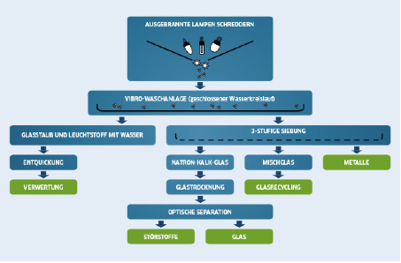 Wie genau funktioniert das Altlampen-Recycling?